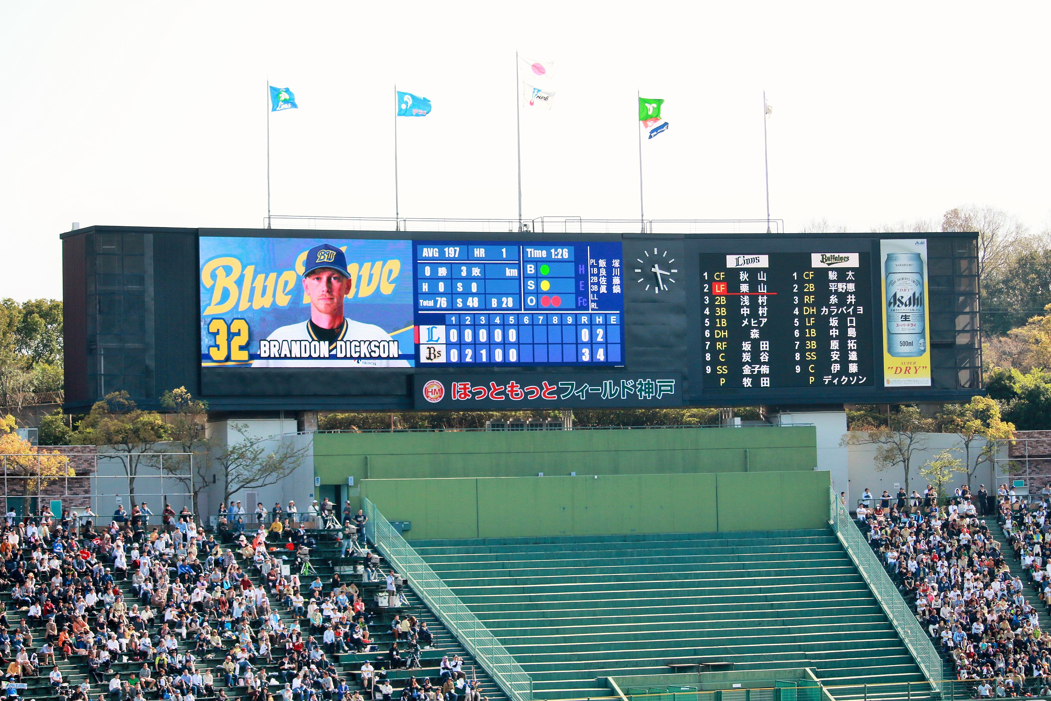 神戸総合運動公園野球場のスコアボード